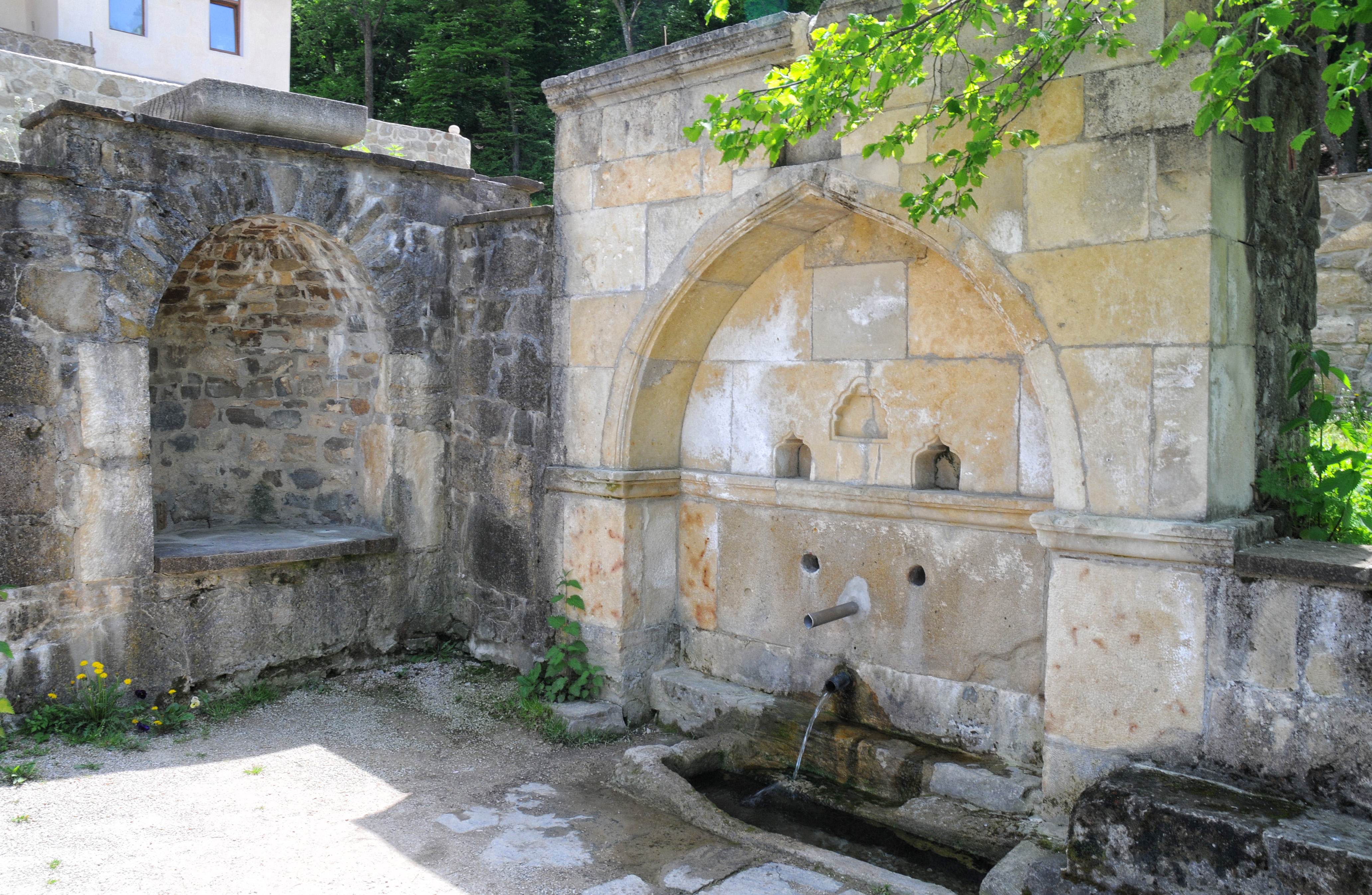 монастир Сурб-Хач, фонтан